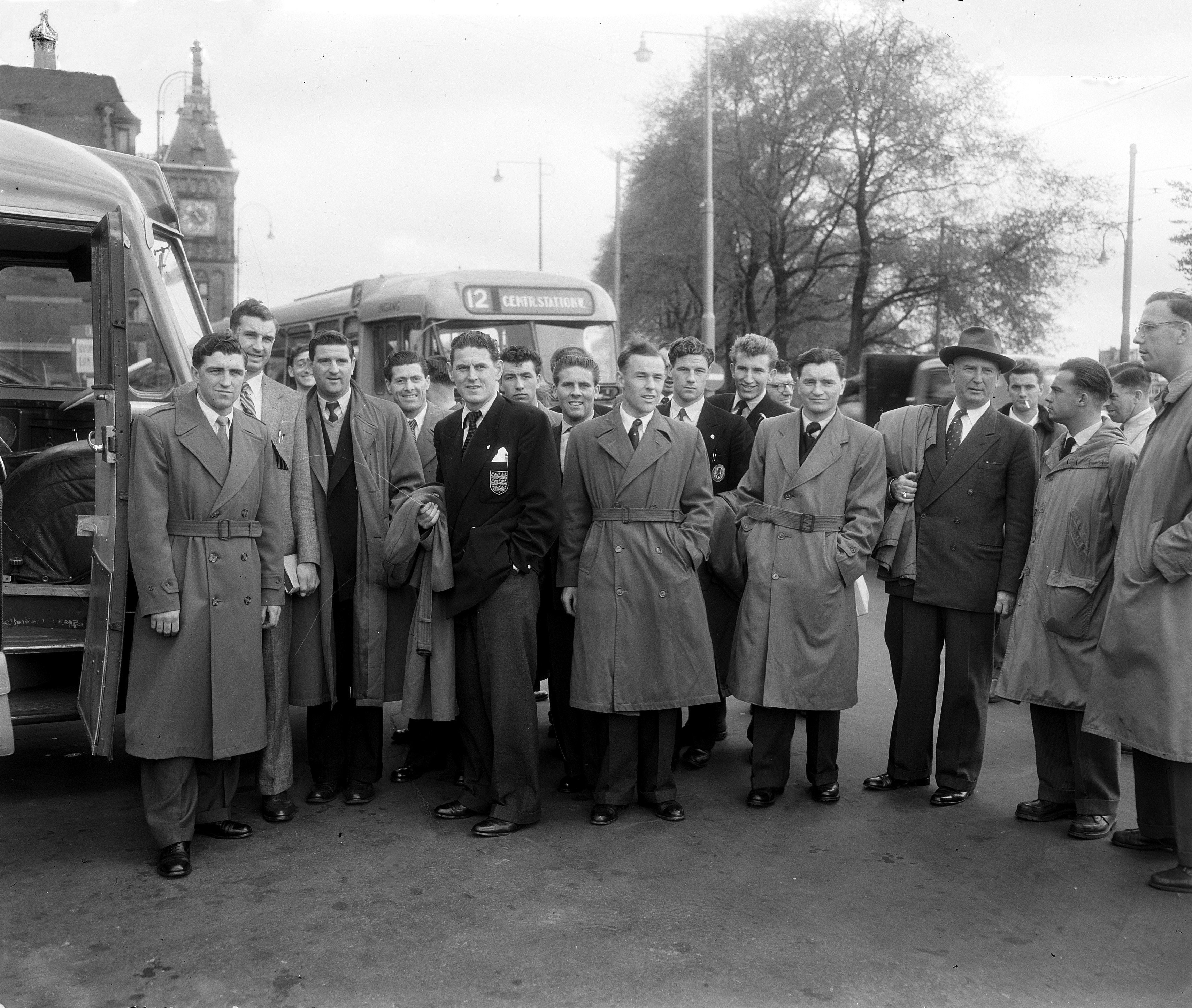 Collectie / Archief : Fotocollectie Anefo Reportage / Serie : [ onbekend ] Beschrijving : Aankomst elftal van Chelsea Datum : 9 mei 1955 Trefwoorden : AANKOMSTEN, ELFTALLEN Fotograaf : Rossem, Wim van / Anefo Auteursrechthebbende : Nationaal Archief Materiaalsoort : Glasnegatief Nummer archiefinventaris : bekijk toegang 2.24.01.09 Bestanddeelnummer : 907-1265